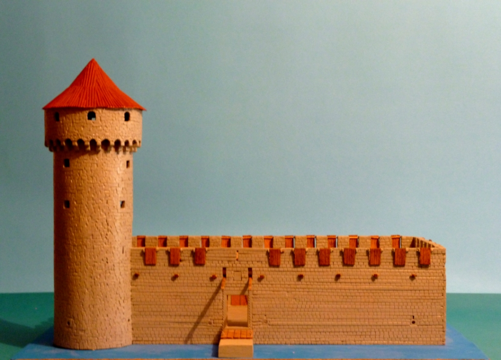 maketa kaštela Cambio u Kaštel Kambelovcu: pogled s kopna